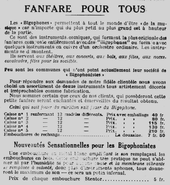 Page du catalogue de L'écho de la gaité française, 65 rue du Faubourg St-Denis, Paris, consacrée aux bigophones (date d'impression : 1927).